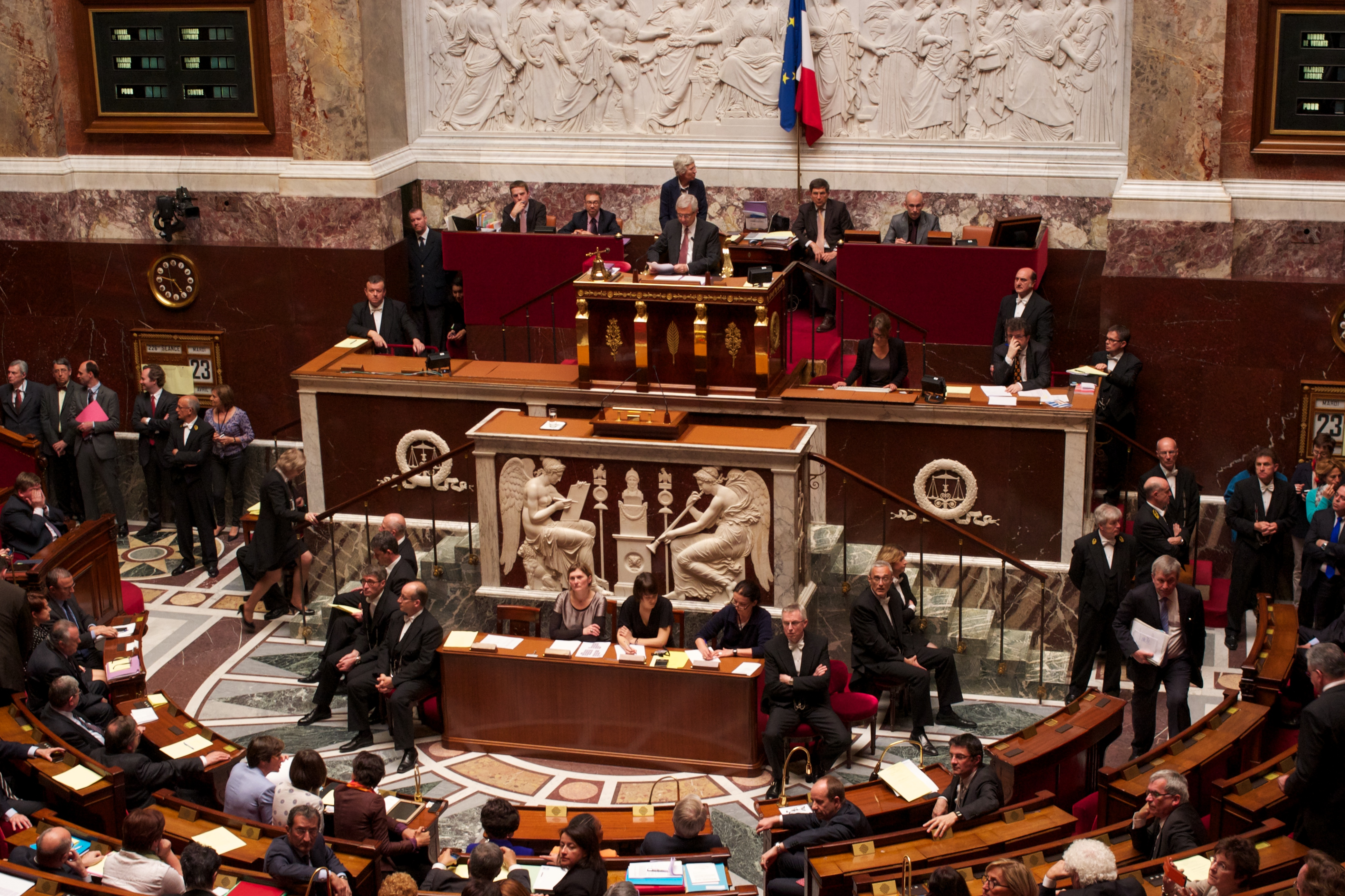 Claude Bartolone au perchoir pendant le vote solennel de la loi ouvrant le mariage aux couples de personnes de même sexe - Assemblée nationale